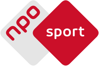 Logo van het digitale TV kanaal NPO Sport.